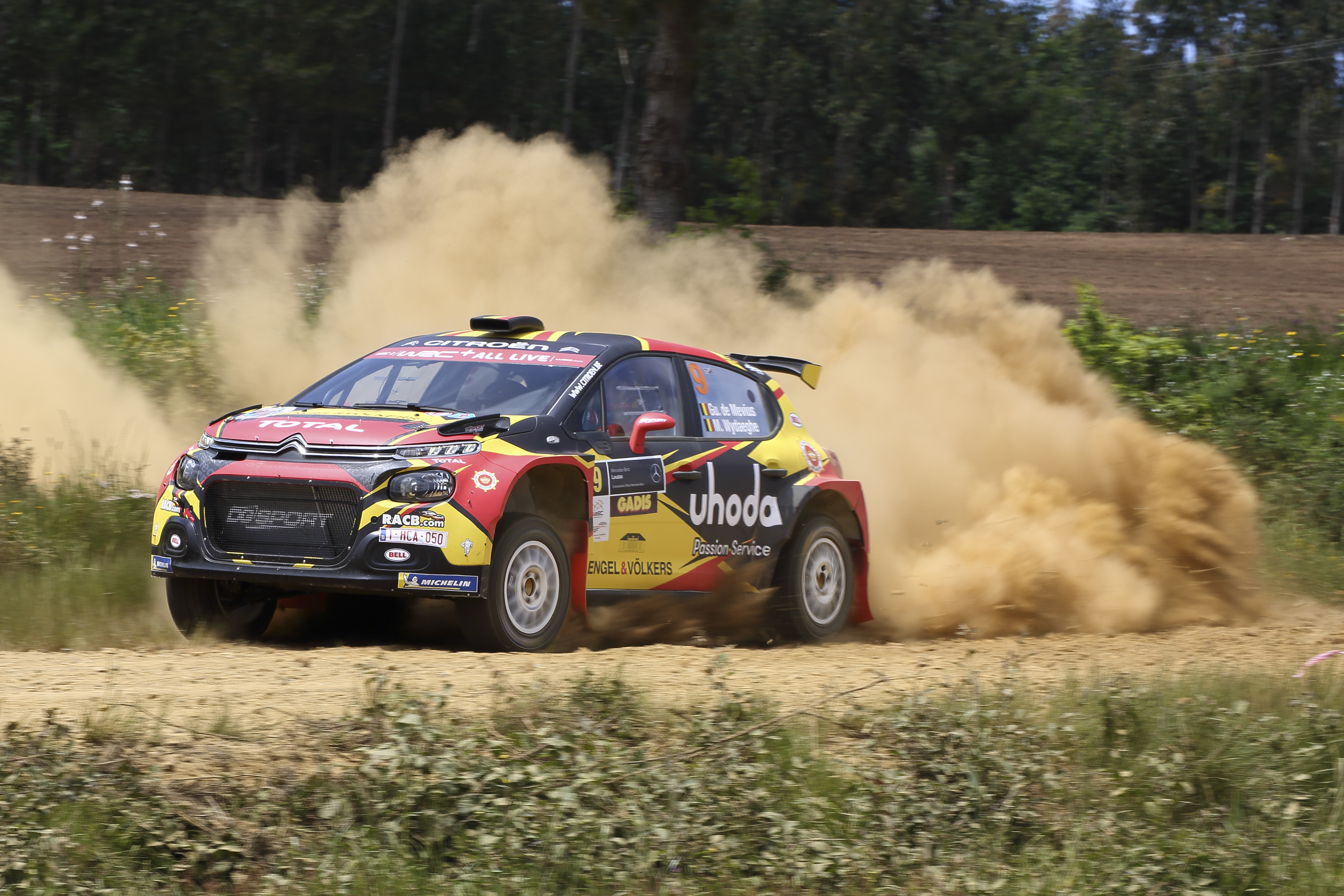 Rally Terra da Auga 2019, sería prueba puntuable para el SCER y CERT, donde Xevi Pons junto a Rodrigo Sanjuán con su Skoda Fabia R5, lograría la victoria que les permitiría volver a ser lideres del Supercampeonato.